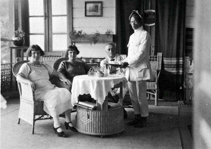 Foto. Huisjongen Amat bedient de familie H.J.A. Sanders en hun gast mevrouw Mulder op de voorgalerij, Lebong Donok